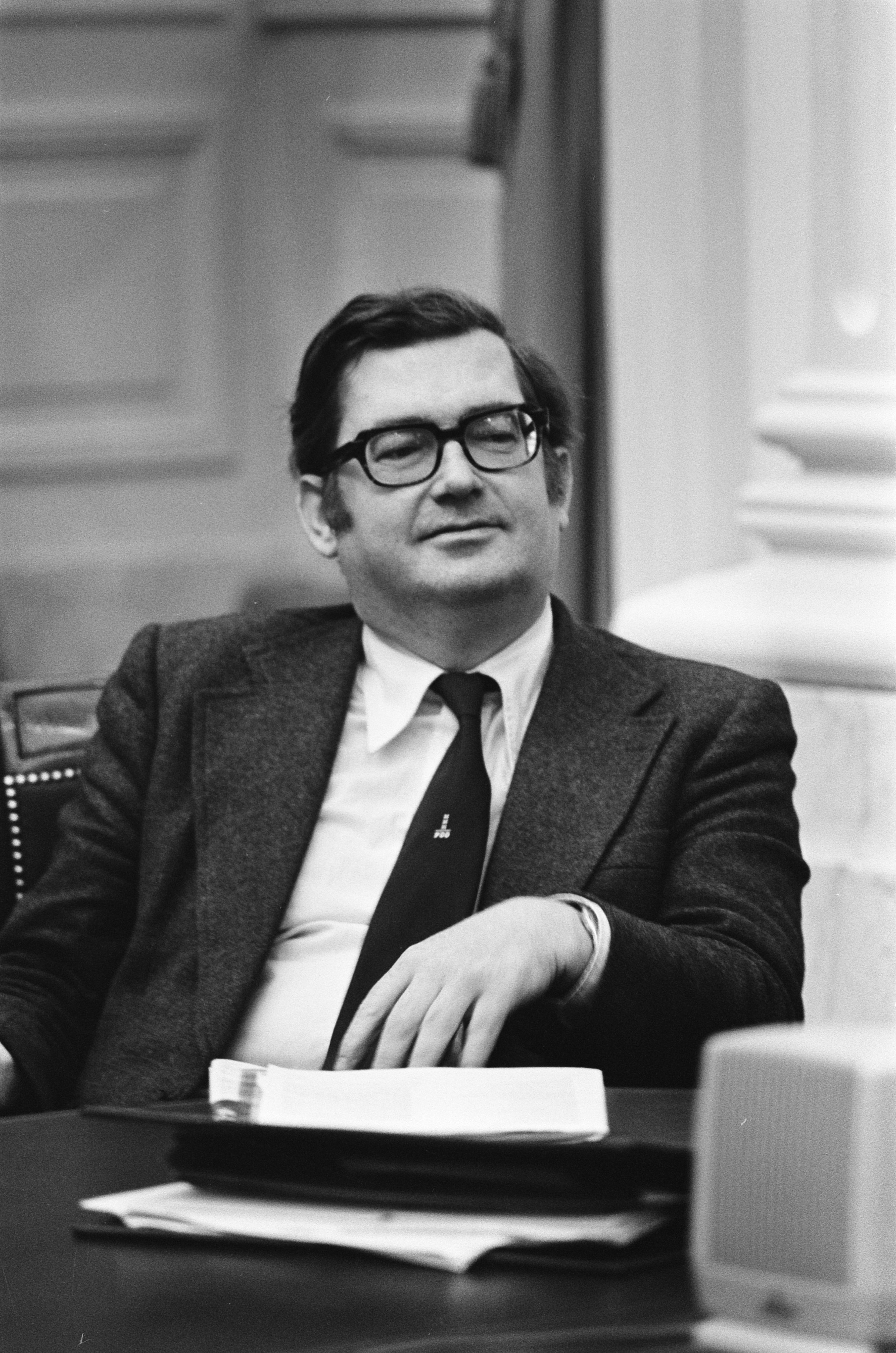 Collectie / Archief : Fotocollectie Anefo Reportage / Serie : [ onbekend ] Beschrijving : Tweede Kamer debat, minister Gruyters Datum : 13 maart 1975 Locatie : Den Haag, Zuid-Holland Trefwoorden : ministers, parlementaire debatten, politiek, portretten Persoonsnaam : Gruijters, J.P.A. Fotograaf : Peters, Hans / Anefo Auteursrechthebbende : Nationaal Archief Materiaalsoort : Negatief (zwart/wit) Nummer archiefinventaris : bekijk toegang 2.24.01.05 Bestanddeelnummer : 927-8015